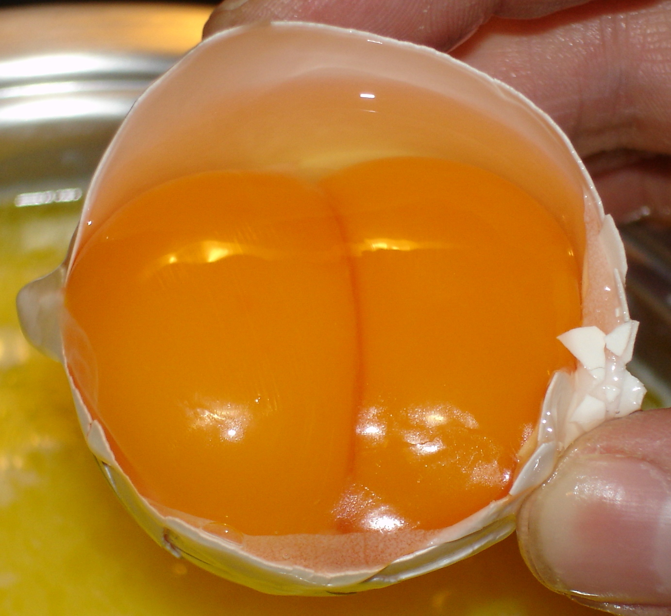 Hühnerei mit doppeltem Dotter